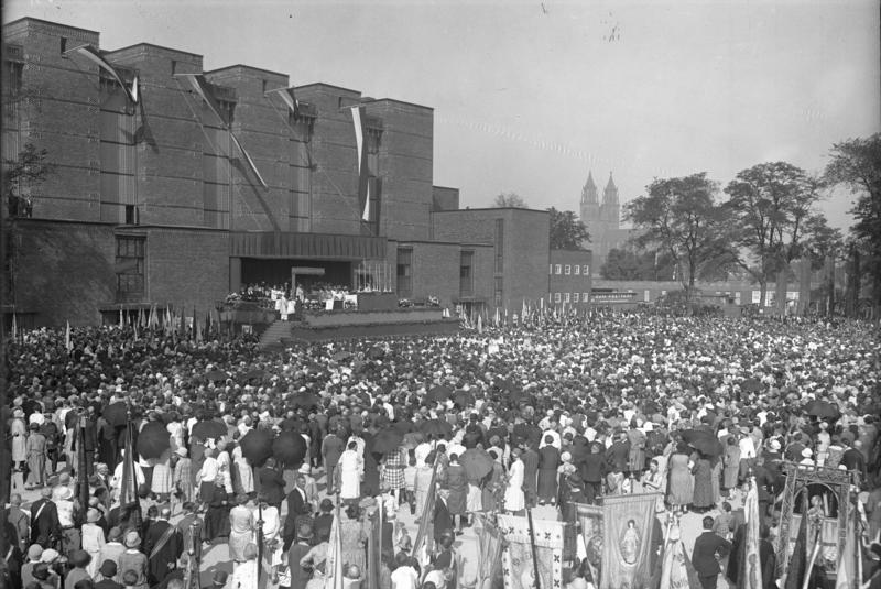 Der große Katholikentag in Magdeburg! Blick in den Ehrenhof der Stadthalle während der feierlichen Messe mit den Zehntausenden von Teilnehmern. Im Hintergrund der Magdeburger Dom.